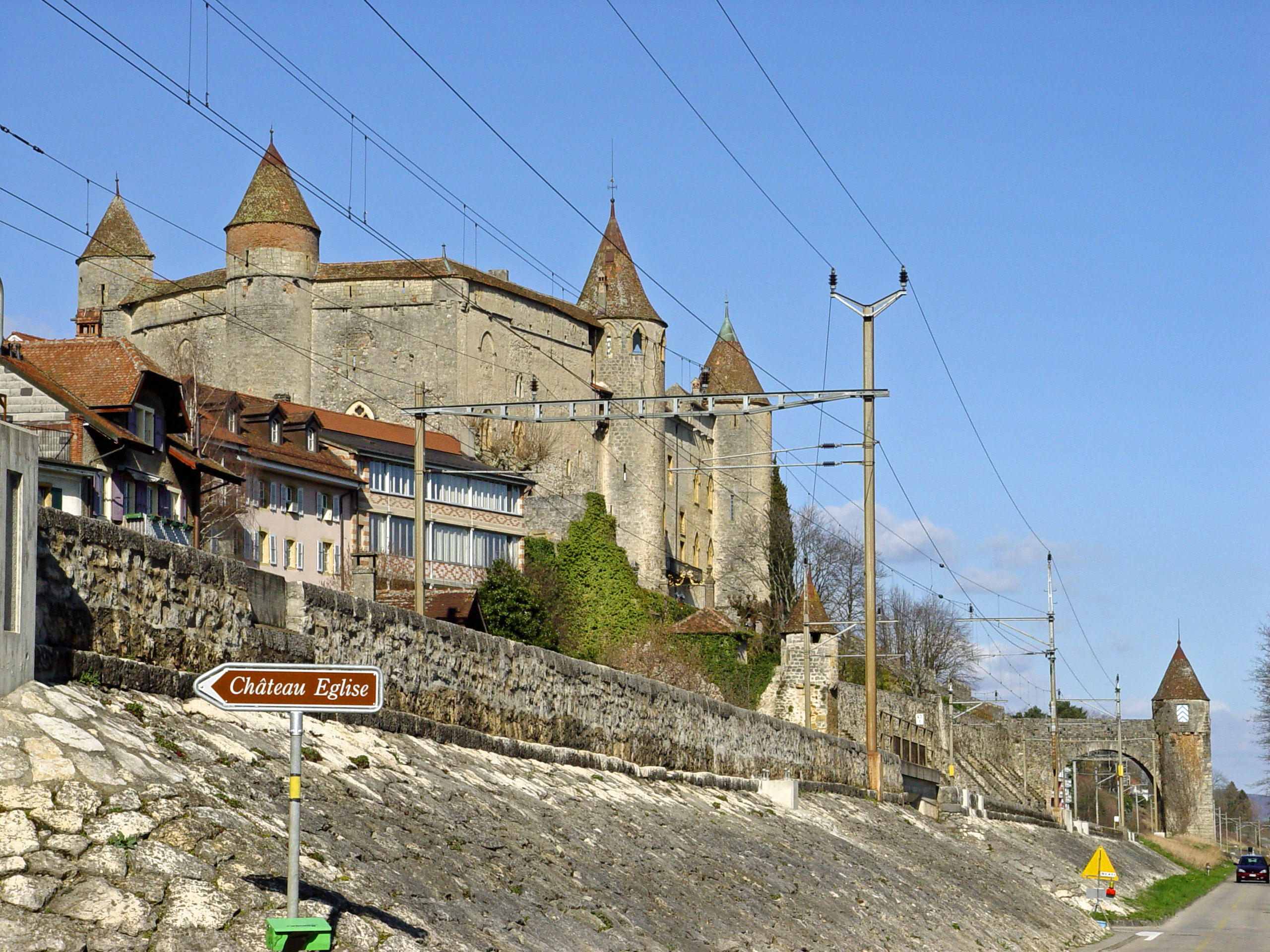 Schloss Grandson gesehen von der Strasse langs Neuenburgersee